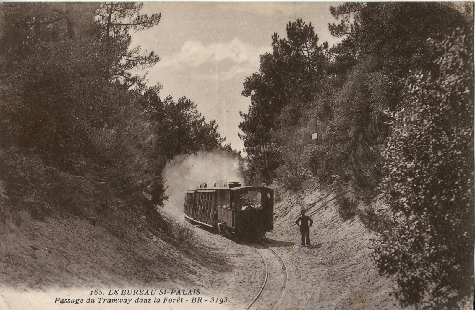 Carte postale ancienne éditée par Bloc Frères, éditeurs à Bordeaux, n°165 (BR 3193) : Le Bureau St-Palais - Passage du Tramway dans la Forêt